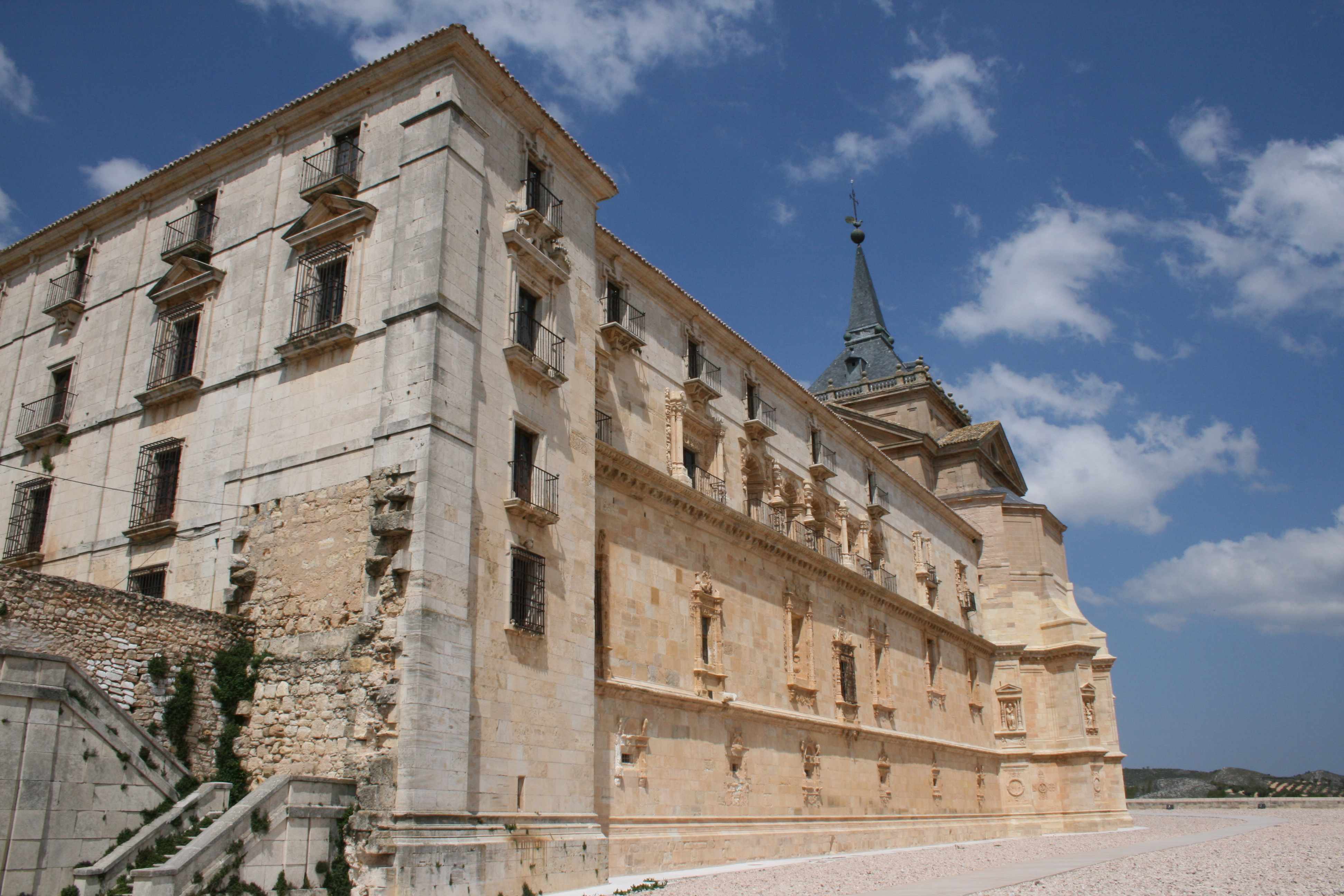 Monasterio de Uclés, Cuenca, España - Vista general de la fachada este (plateresca)